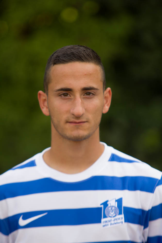 German football player Erdoğan Yeşilyurt, MSV Duisburg